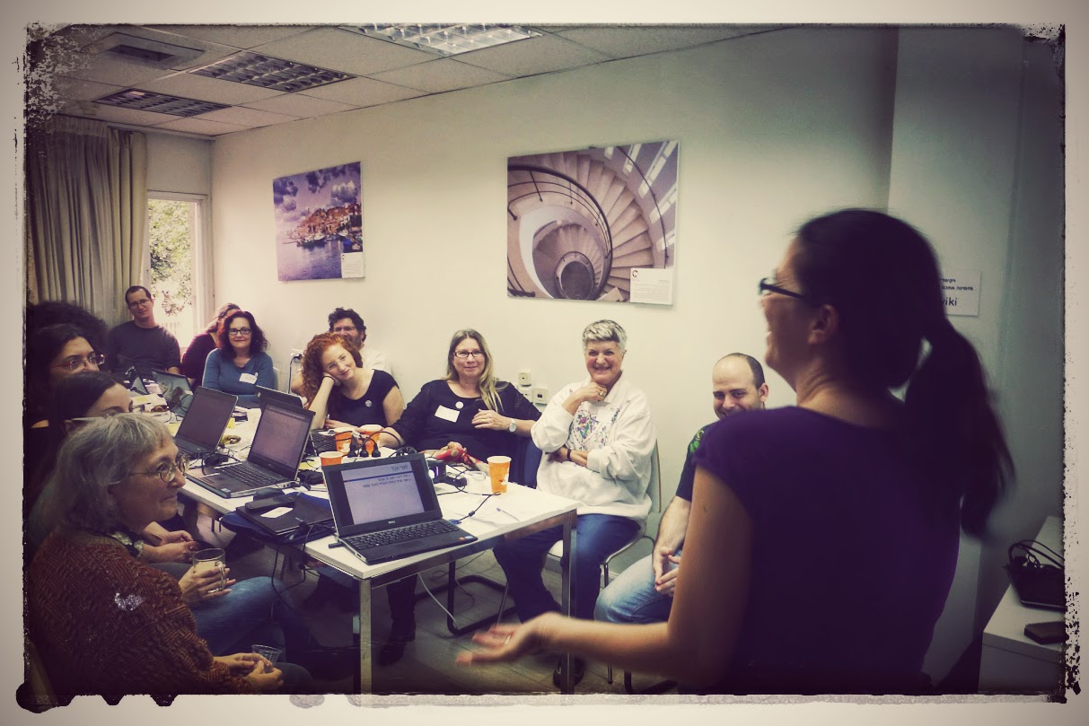 ביום שישי ה- 12.12.2014 התקיים המפגש ויקי נשים מפגש 2: נשים במדע. דר' קרן לנדסמן הייתה המרצה האורחת והאירוע כלל הדרכה למתחילות, ו/או ריענון לותיקות, לפני ההרצאה וסשן העריכה. enI Wiki Women Editors Project - Women in Science